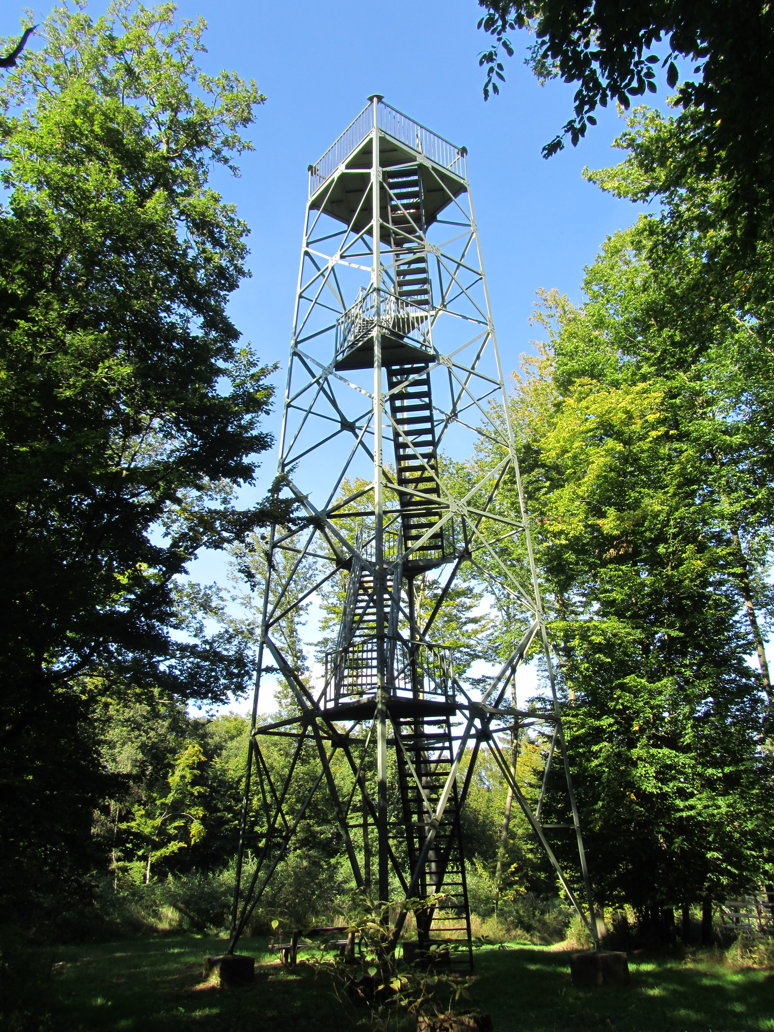 Der 19 m hohe Pionierturm auf dem Mäuseberg (415 m) bei Waldkappel im Werra-Meißner-Kreis.